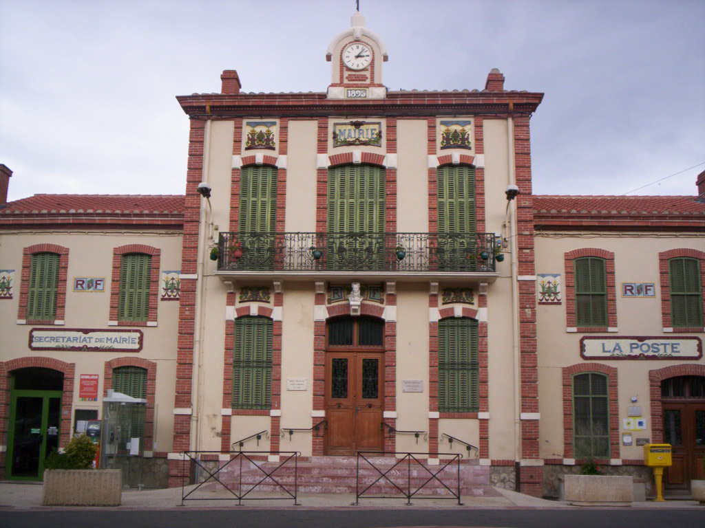 Mairie de Tautavel, (Pyrénées-Orientales, France).